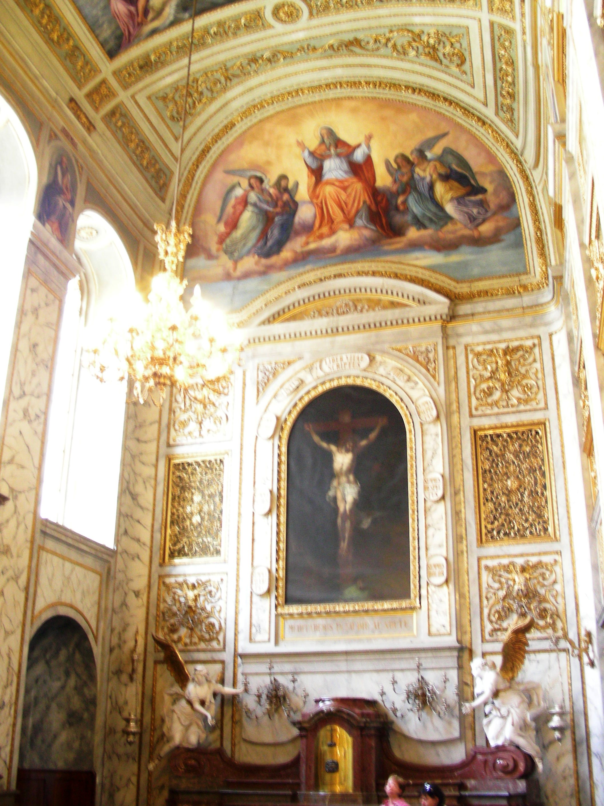 kilise